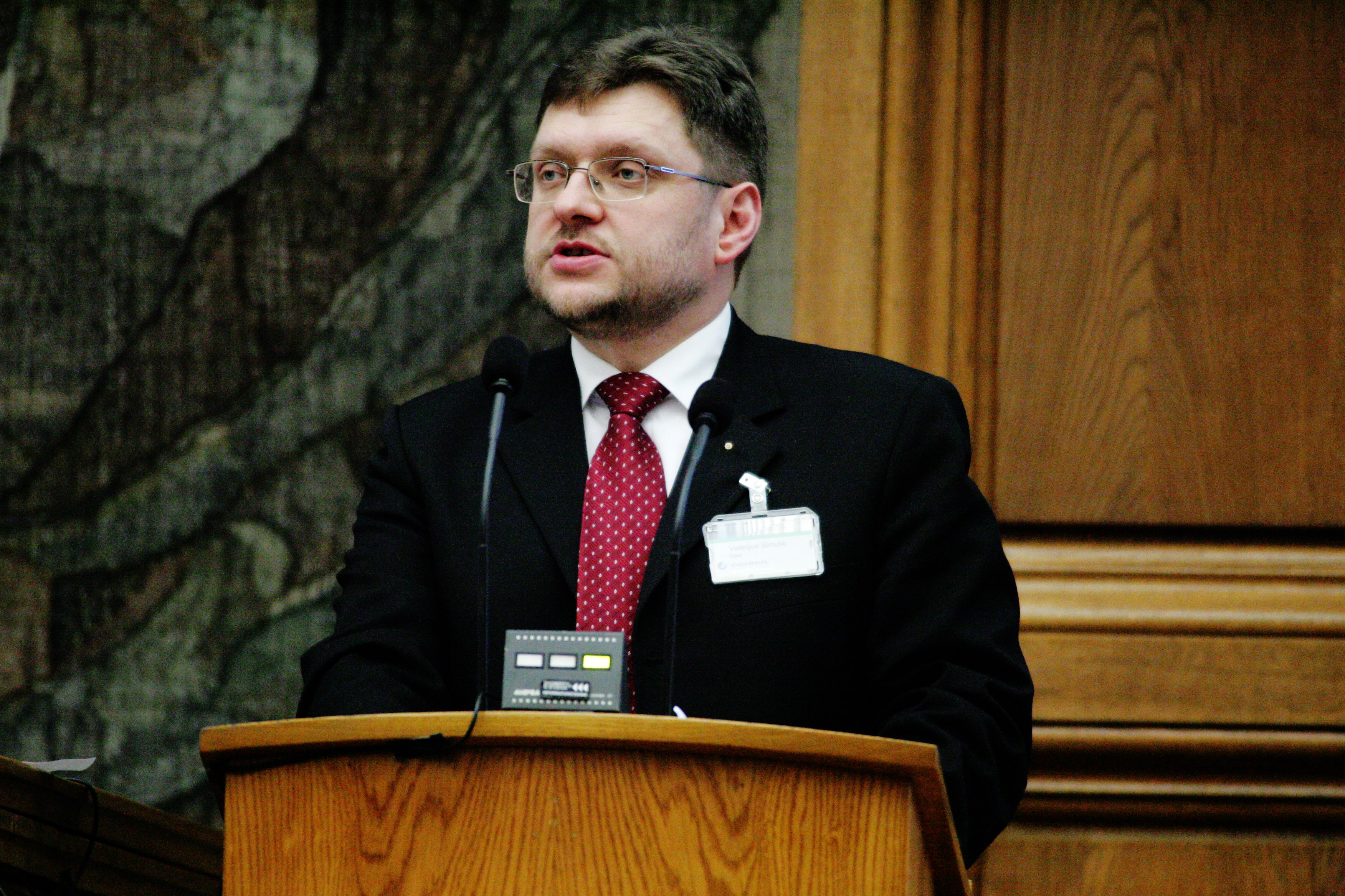 Baltiska församlingens president Valerius Simulik under Nordiska rådets session i Köpenhamn 2006.